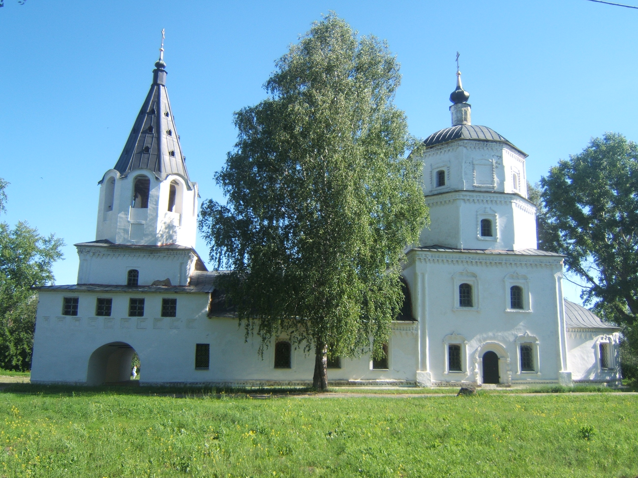 Музей А. Н. Радищева. Спасо-Преображенская церковь. XVIII век.